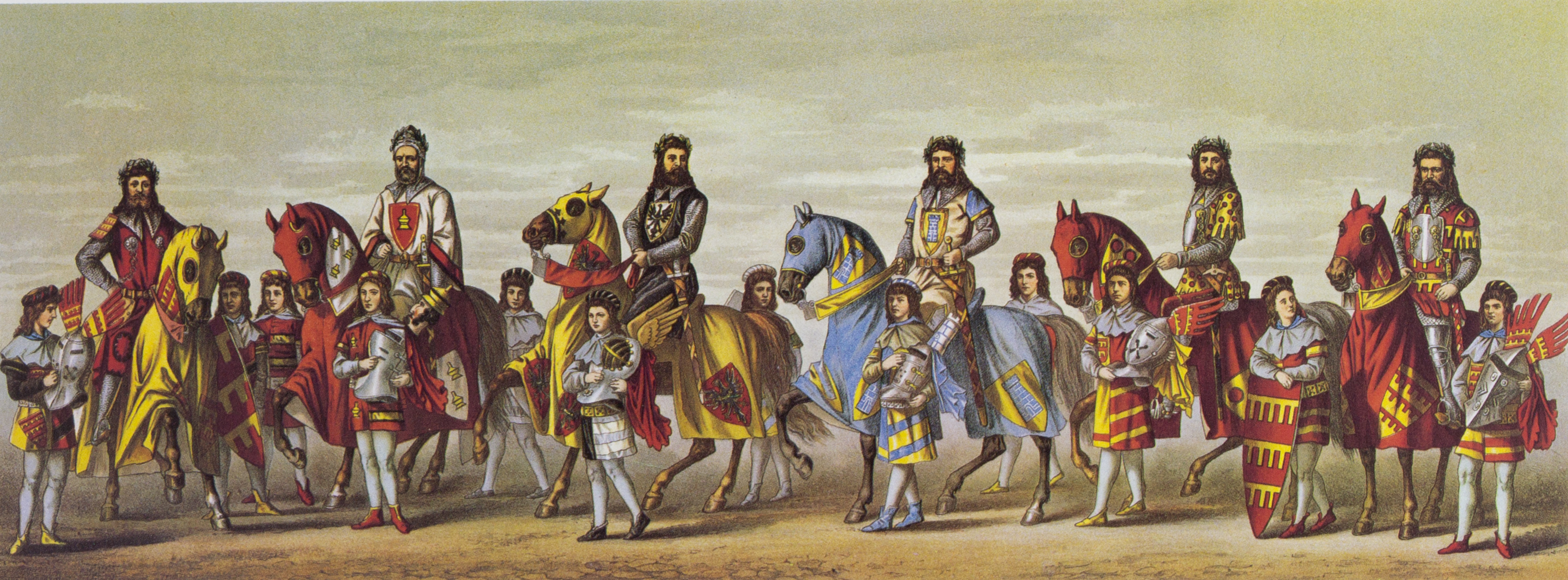 Tony Avenarius: Historischer Festzug veranstaltet bei der Feier der Vollendung des Kölner Doms am 18. October 1880. Tafel VIII